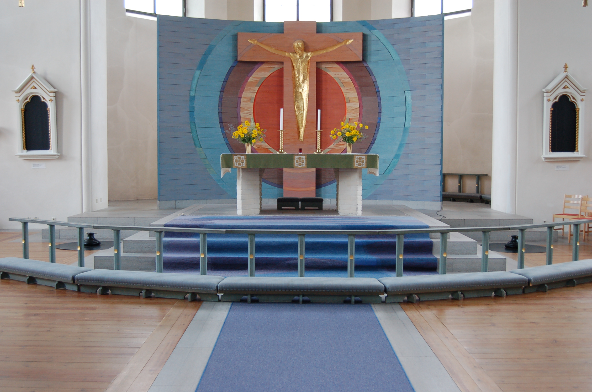 Brunskogs kyrkas altarkor